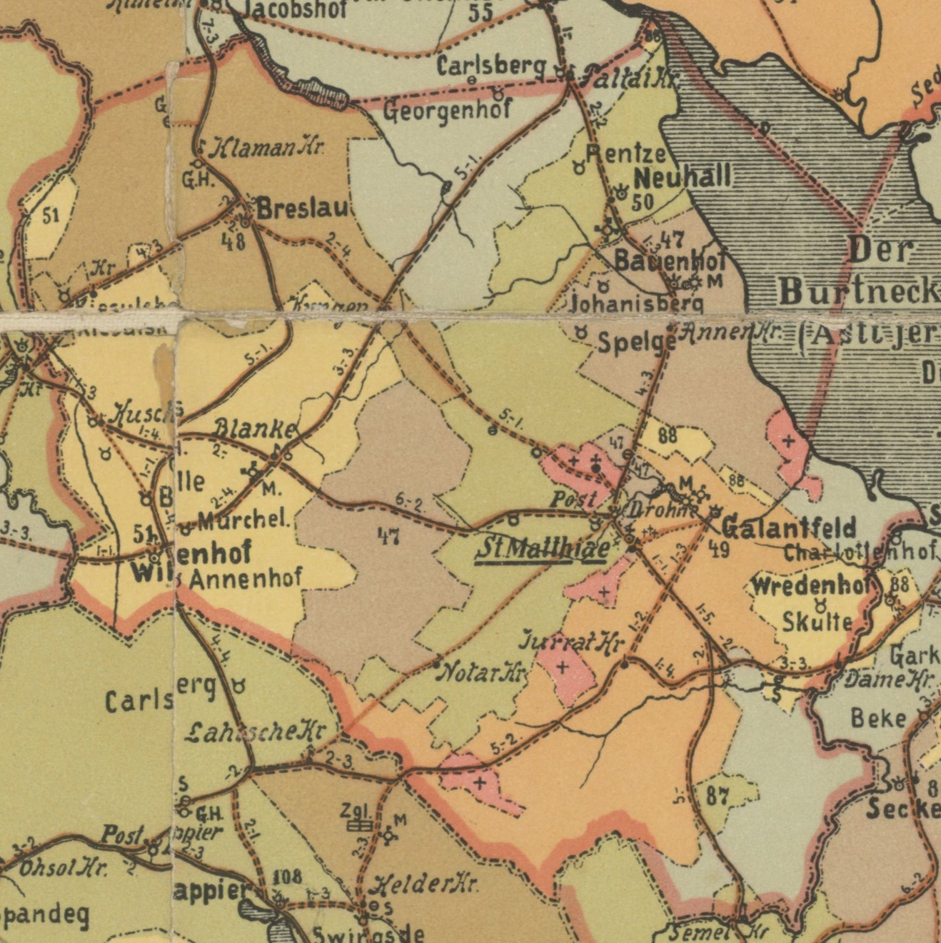 Matīši kihelkonna mõisad 1903. aasta kaardil.